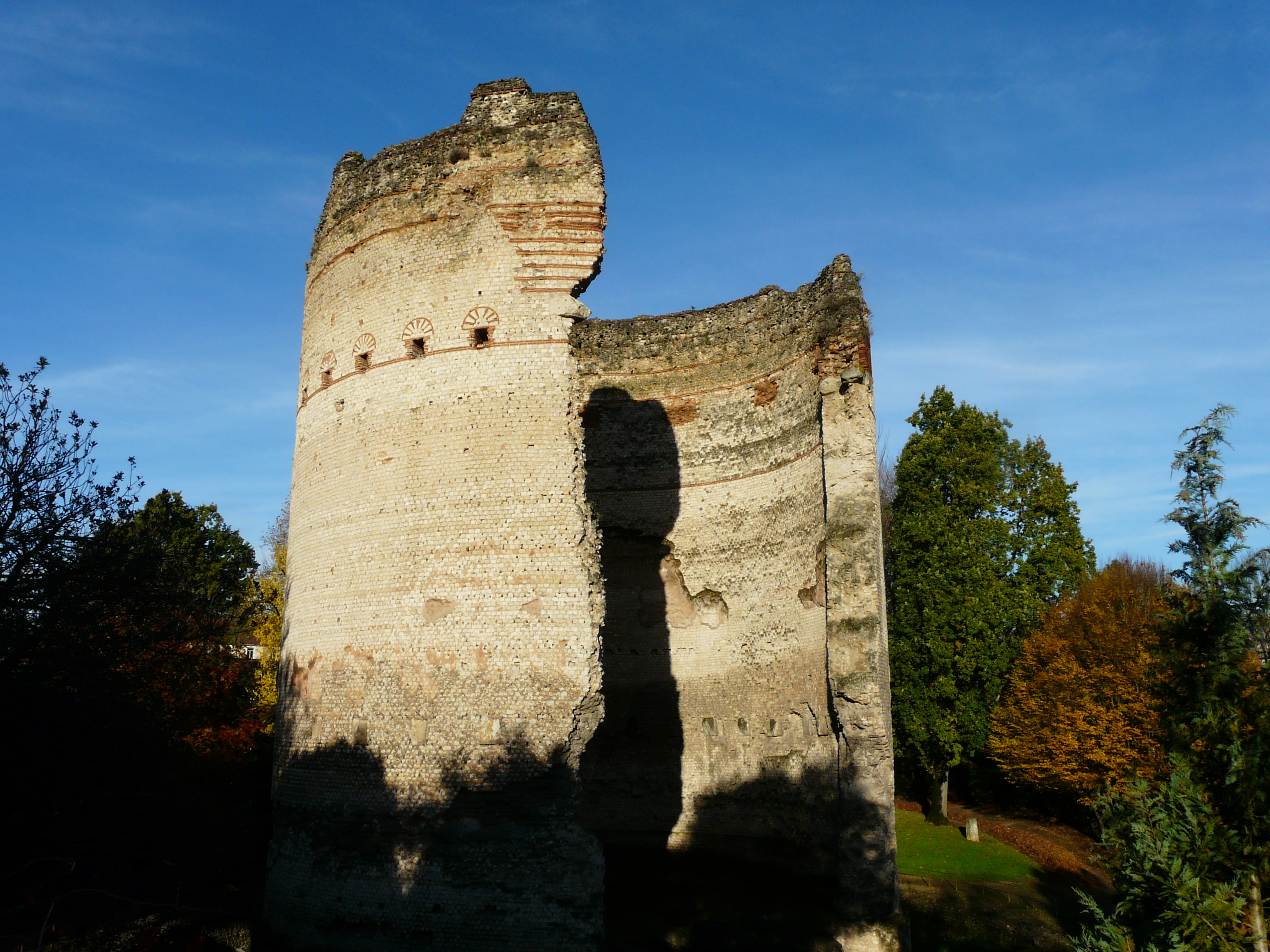 La tour de Vésone, Périgueux, Dordogne, France.